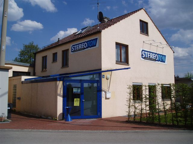 Bild vom Jugendkulturhaus STEREOTON, Erstellt im Frühjahr 2006 von Markus Bzduch